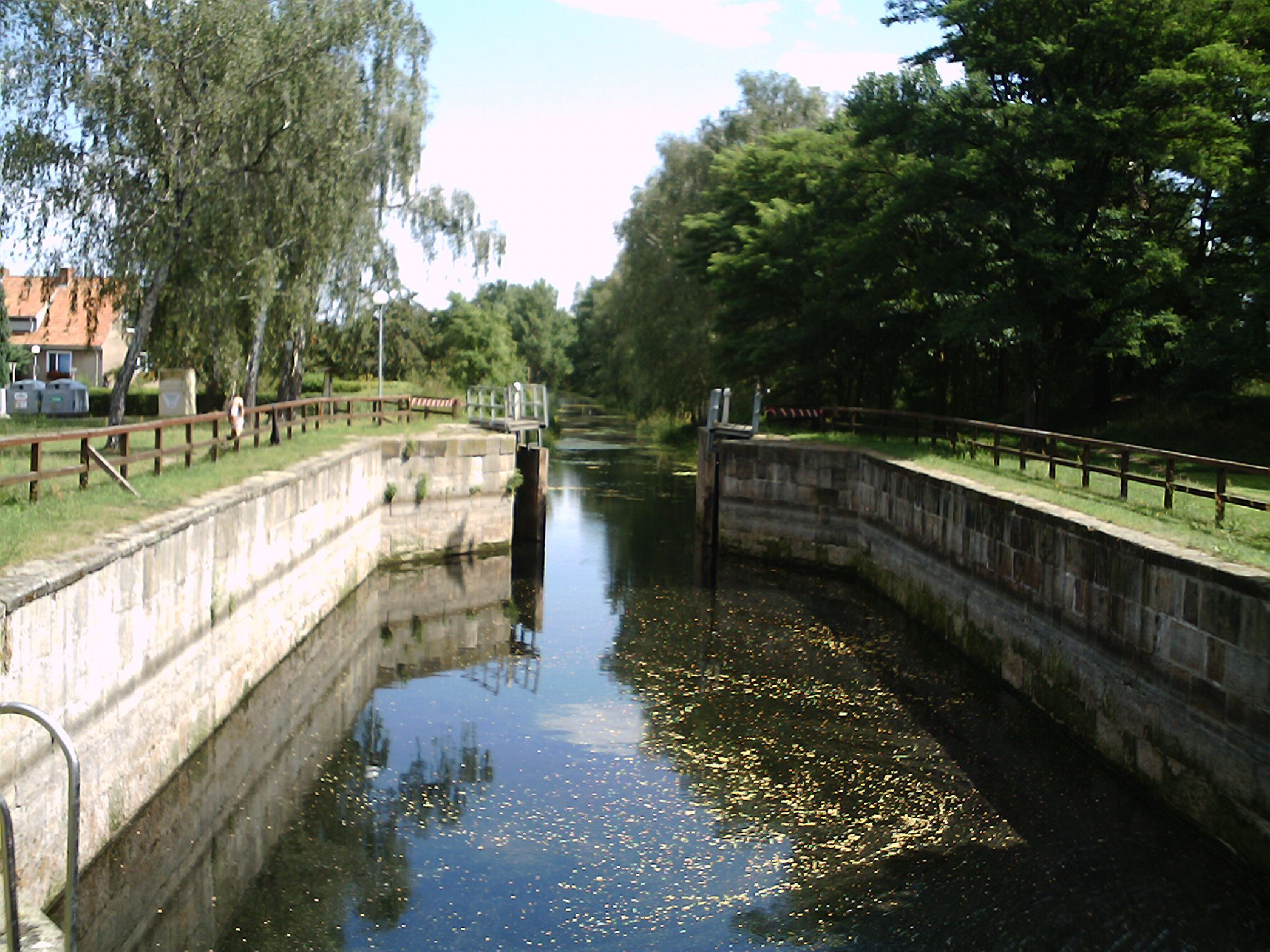 Die Schleuse in Prösen, Deutschland.